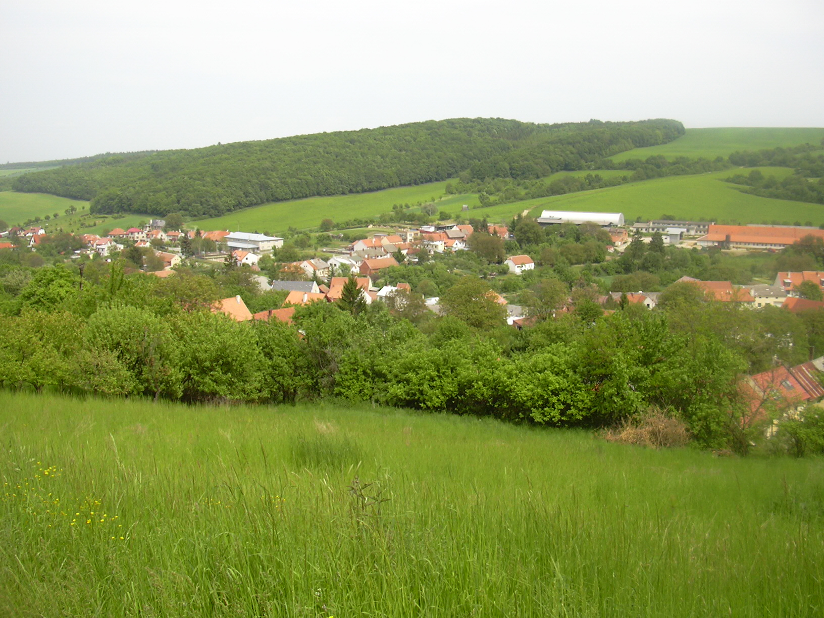 Panorama Orlovic (Vyškov- Czech republic)